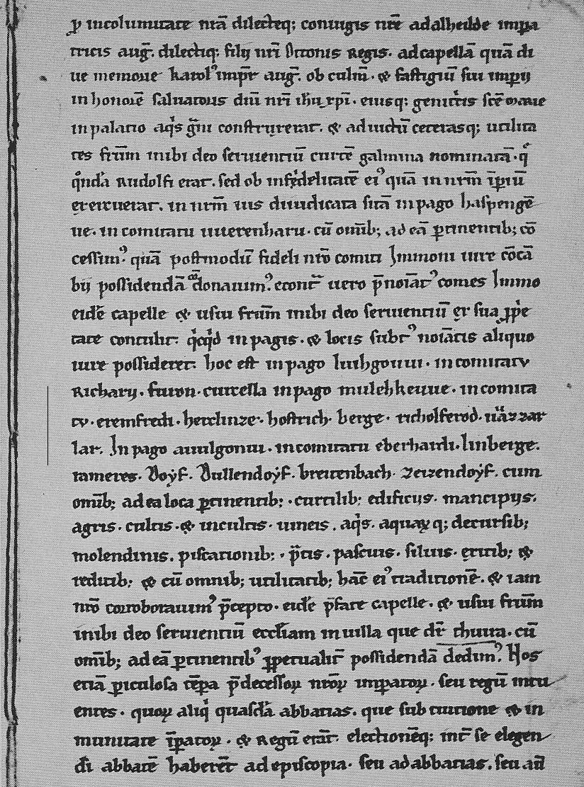 Copial der Tauschurkunde aus dem Jahre 966